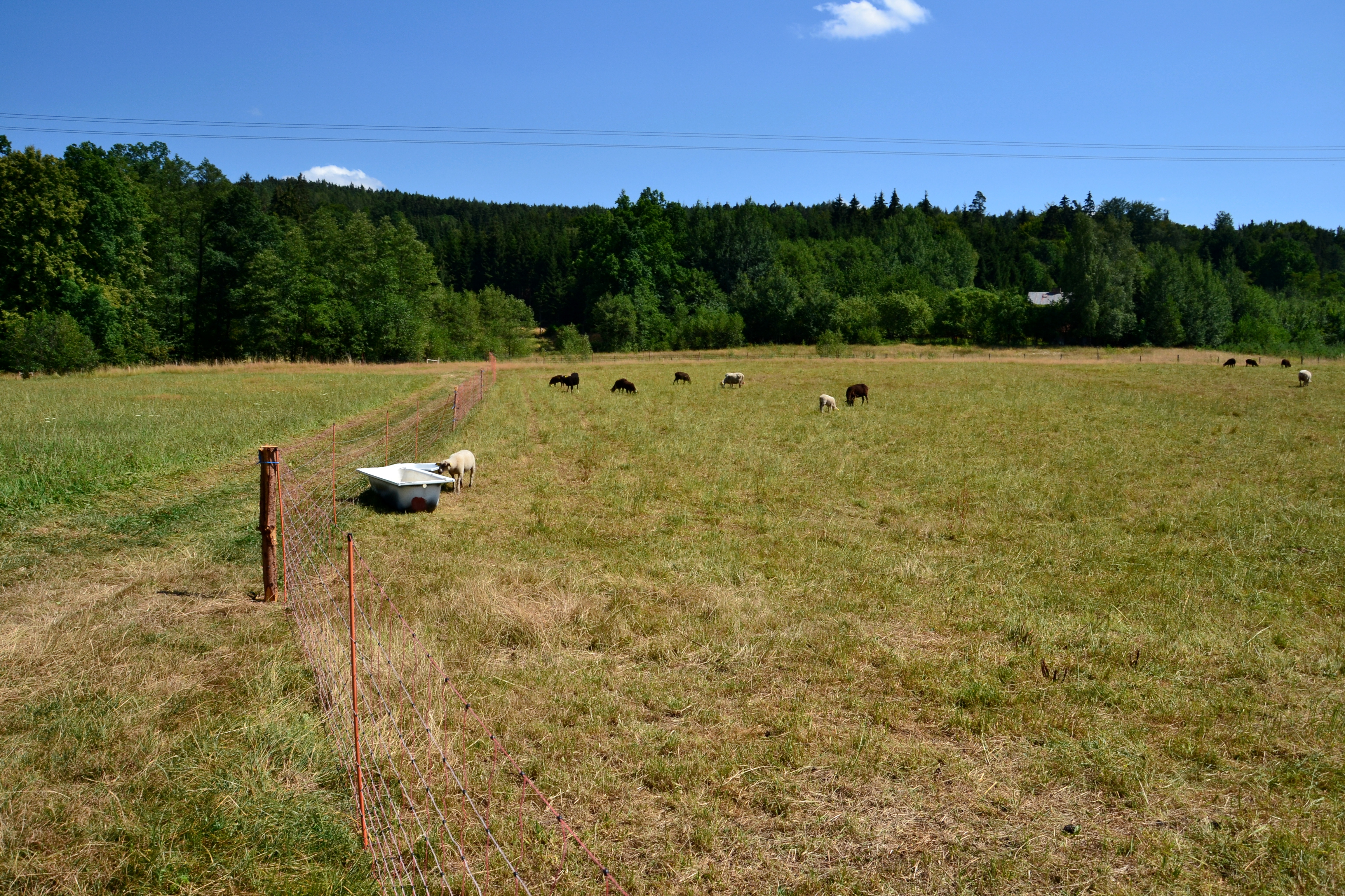 Část chráněného území využívaná jako pastvina